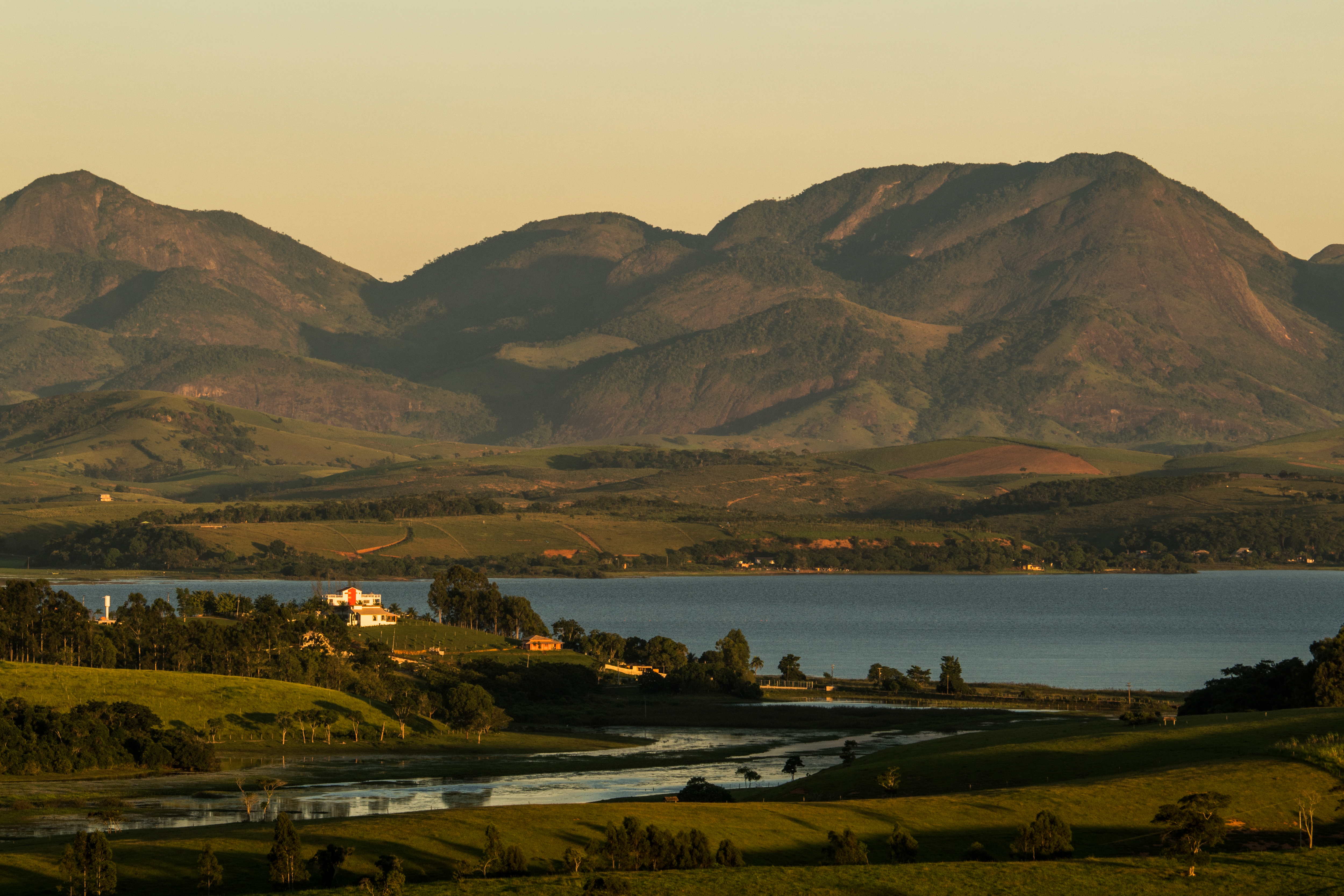 O inicio da Serra do Desengano em Campos ao amanhecer com seu entorno e a Lagoa de Cima.